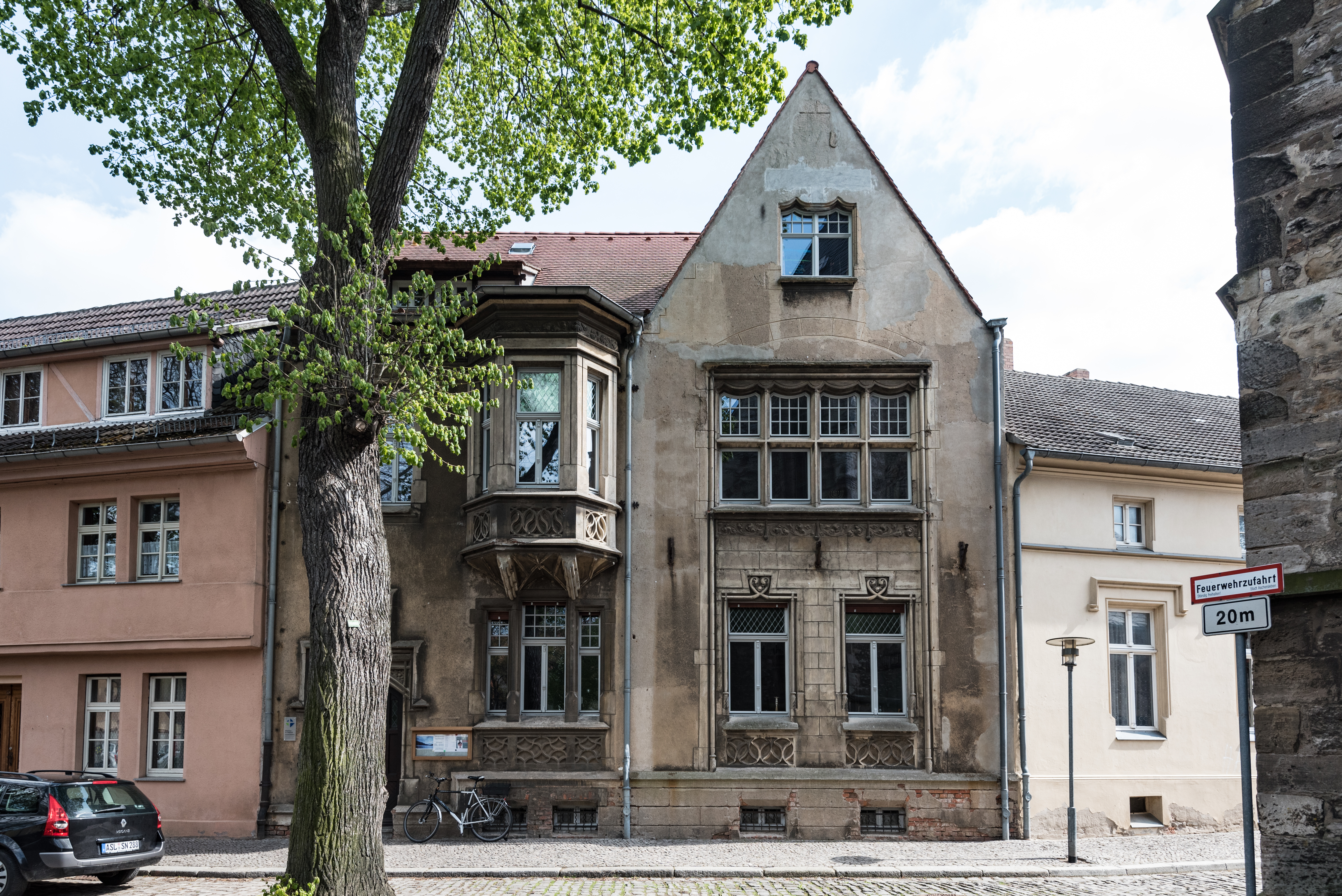 Aschersleben, Stephanikirchhof 9